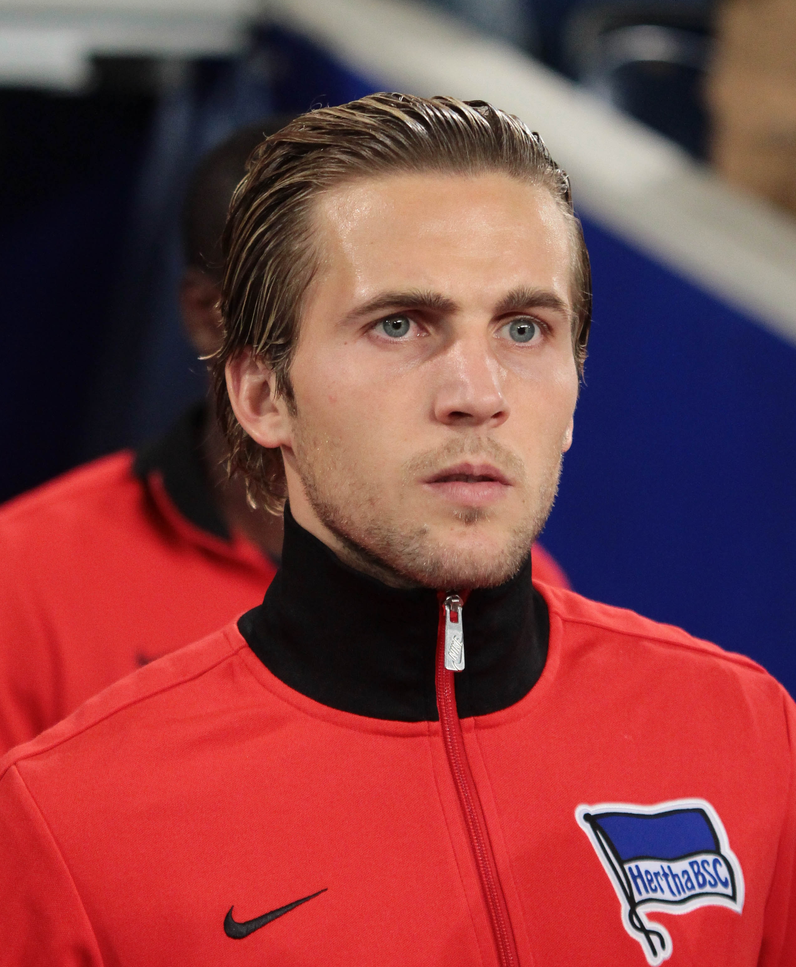 Slovak footballer Peter Pekarík, Hertha BSC